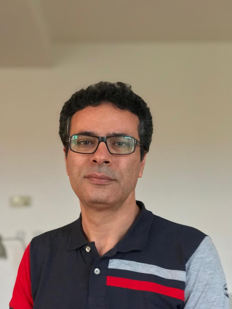 رضا شکراللهی